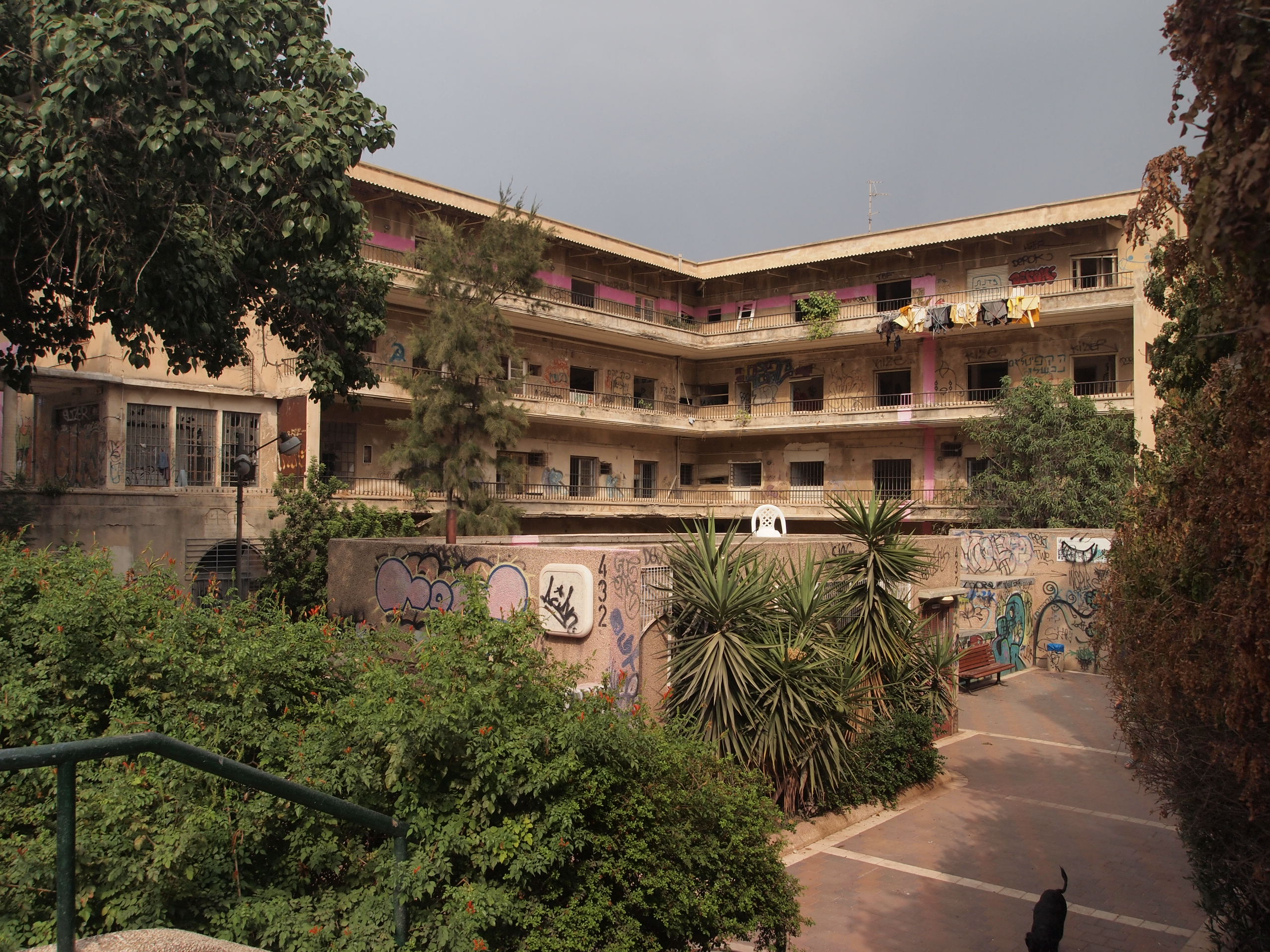 מעונות העובדים ד' - ו' (מעונות הו"ד) בתל אביב